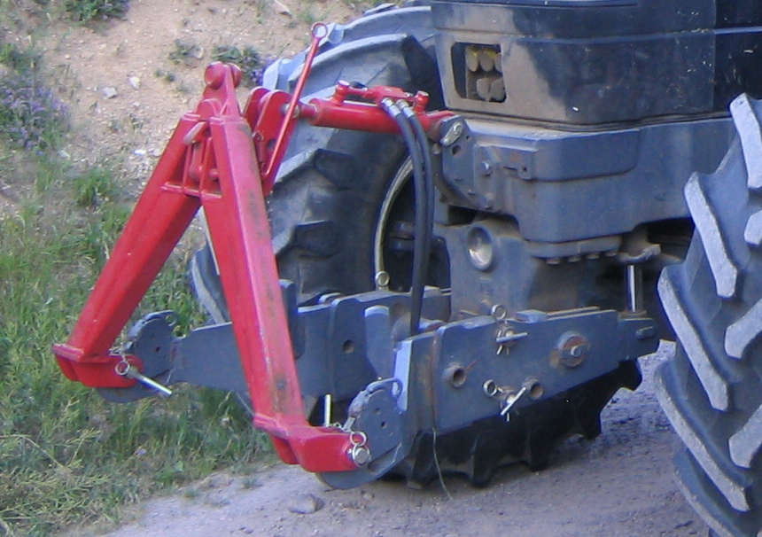 Weiste-Dreieck am Fronthubwerk eines New-Holland-Traktors TM165